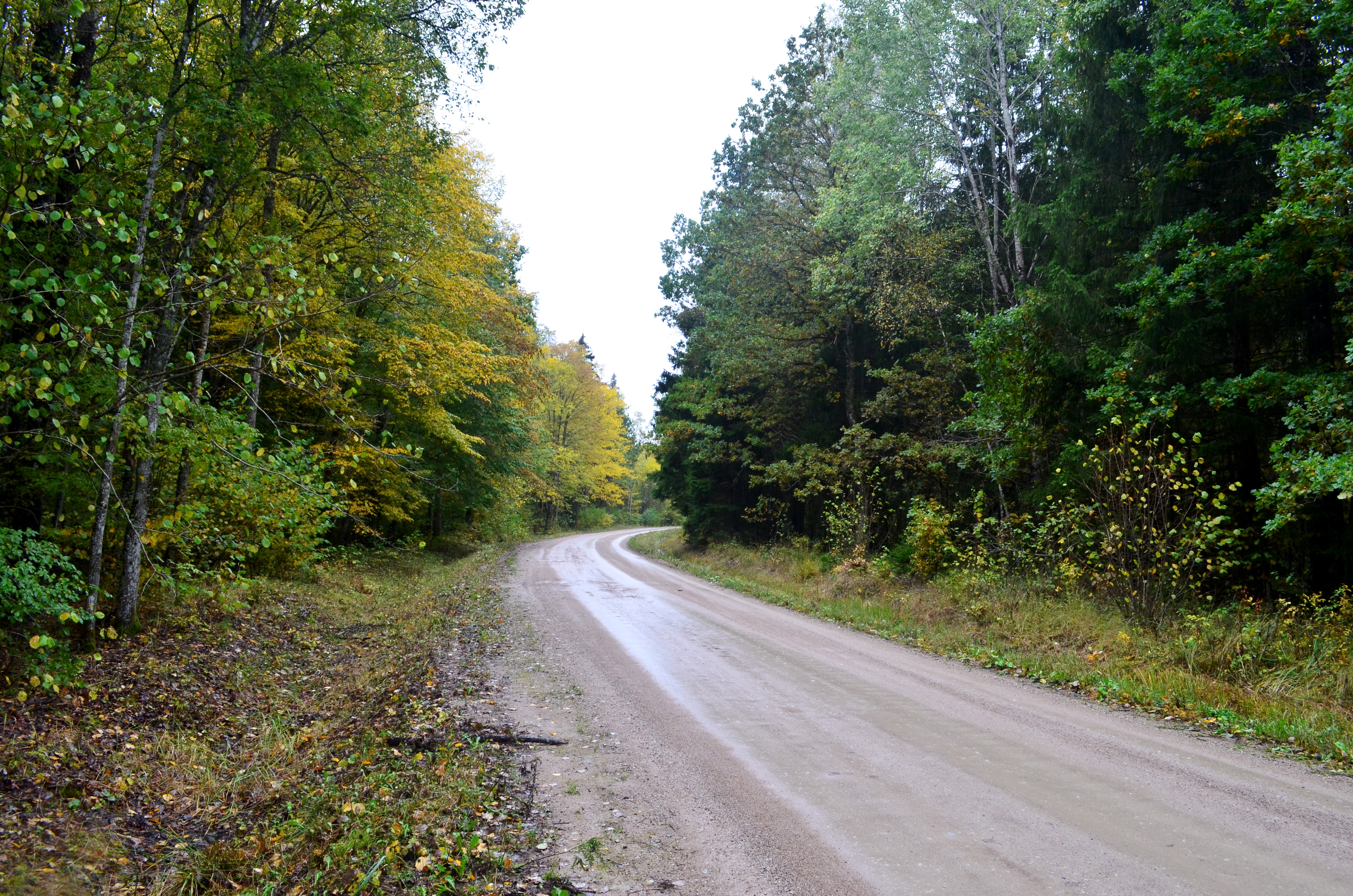 Vaineikių miškas į rytus nuo Vaineikių, Kretingos raj.